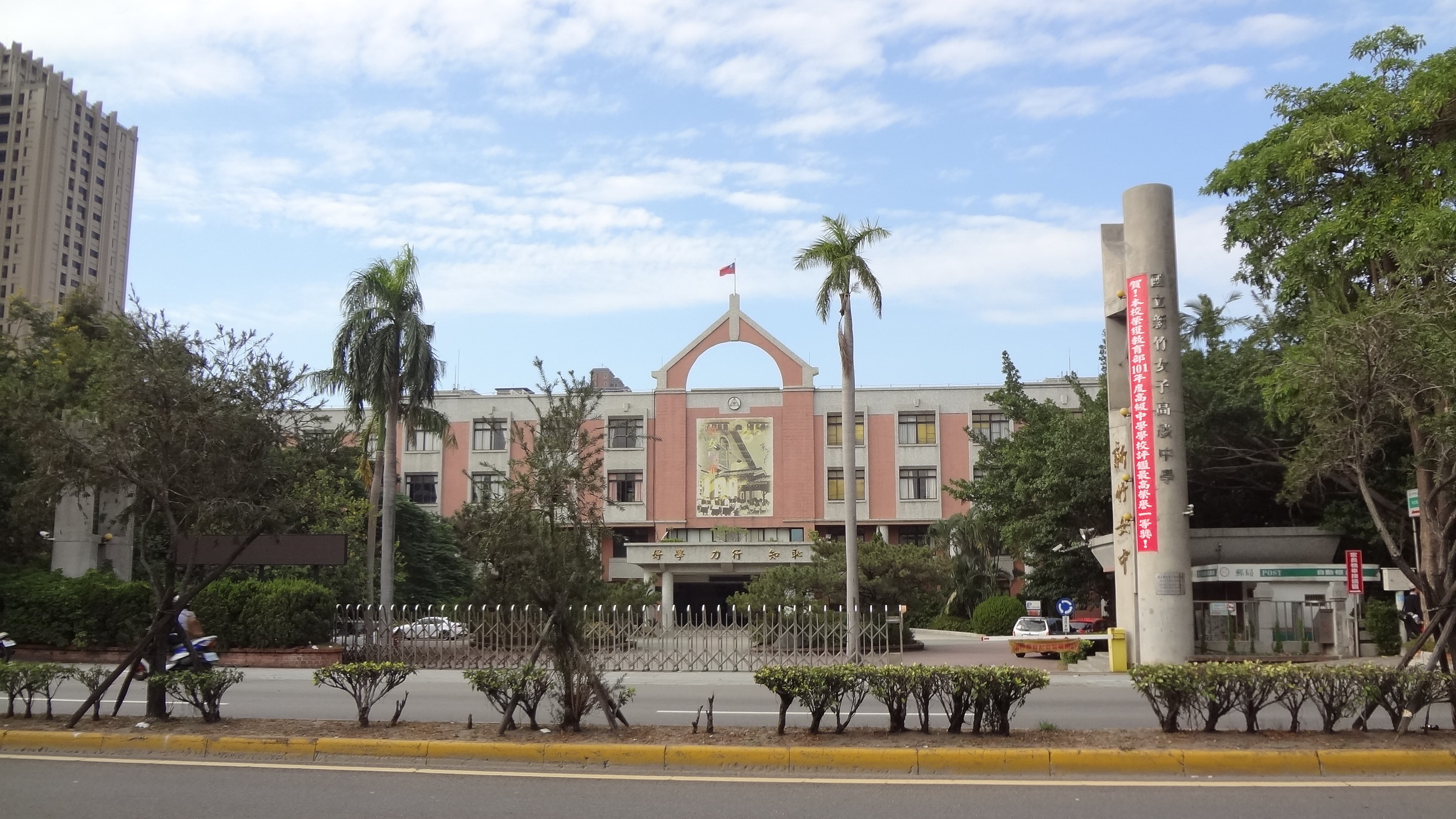 中文（台灣）: 國立新竹女子高級中學，位於臺灣新竹市東區中華路二段270號。